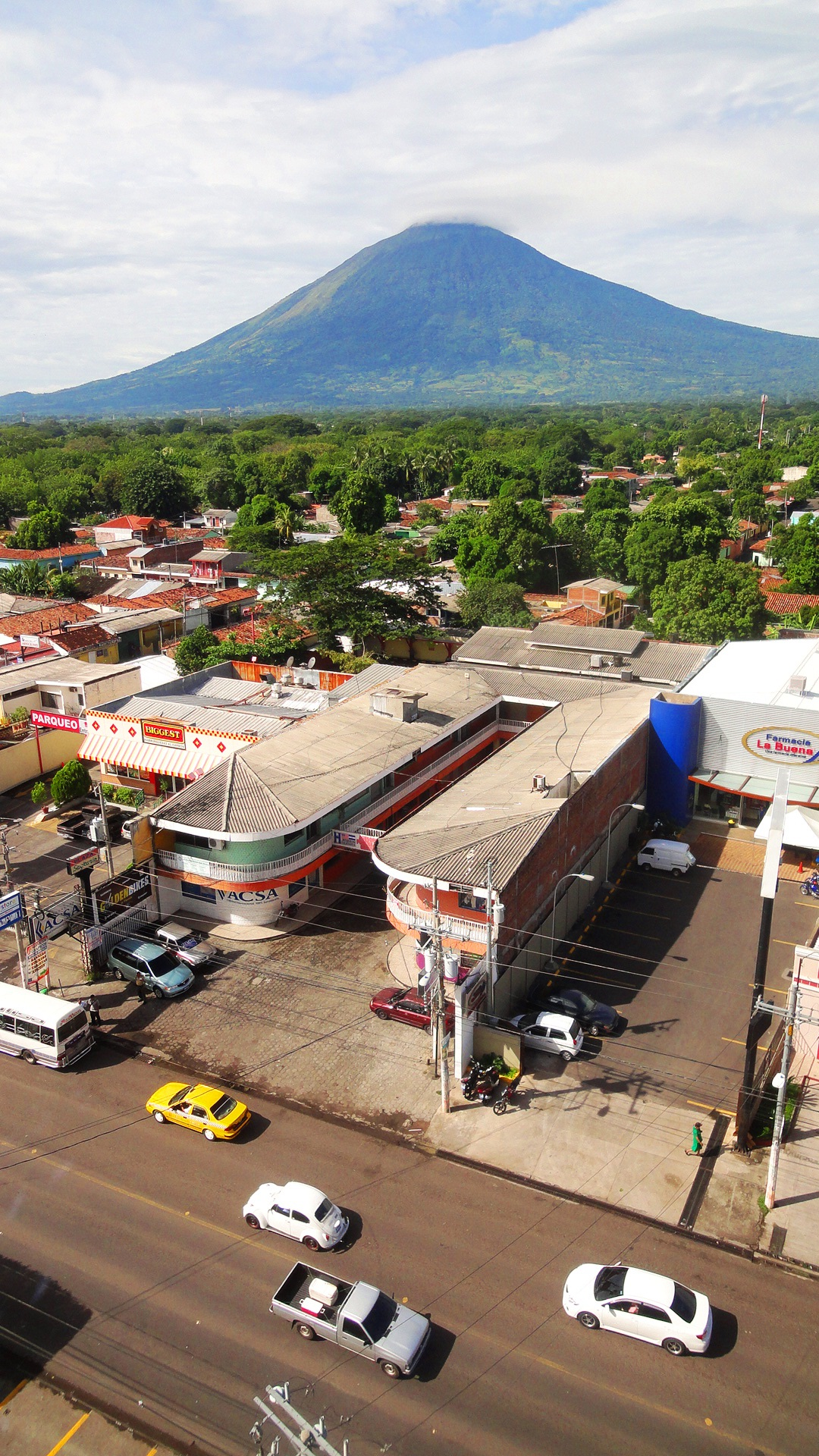 San Miguel Villle et Volcan